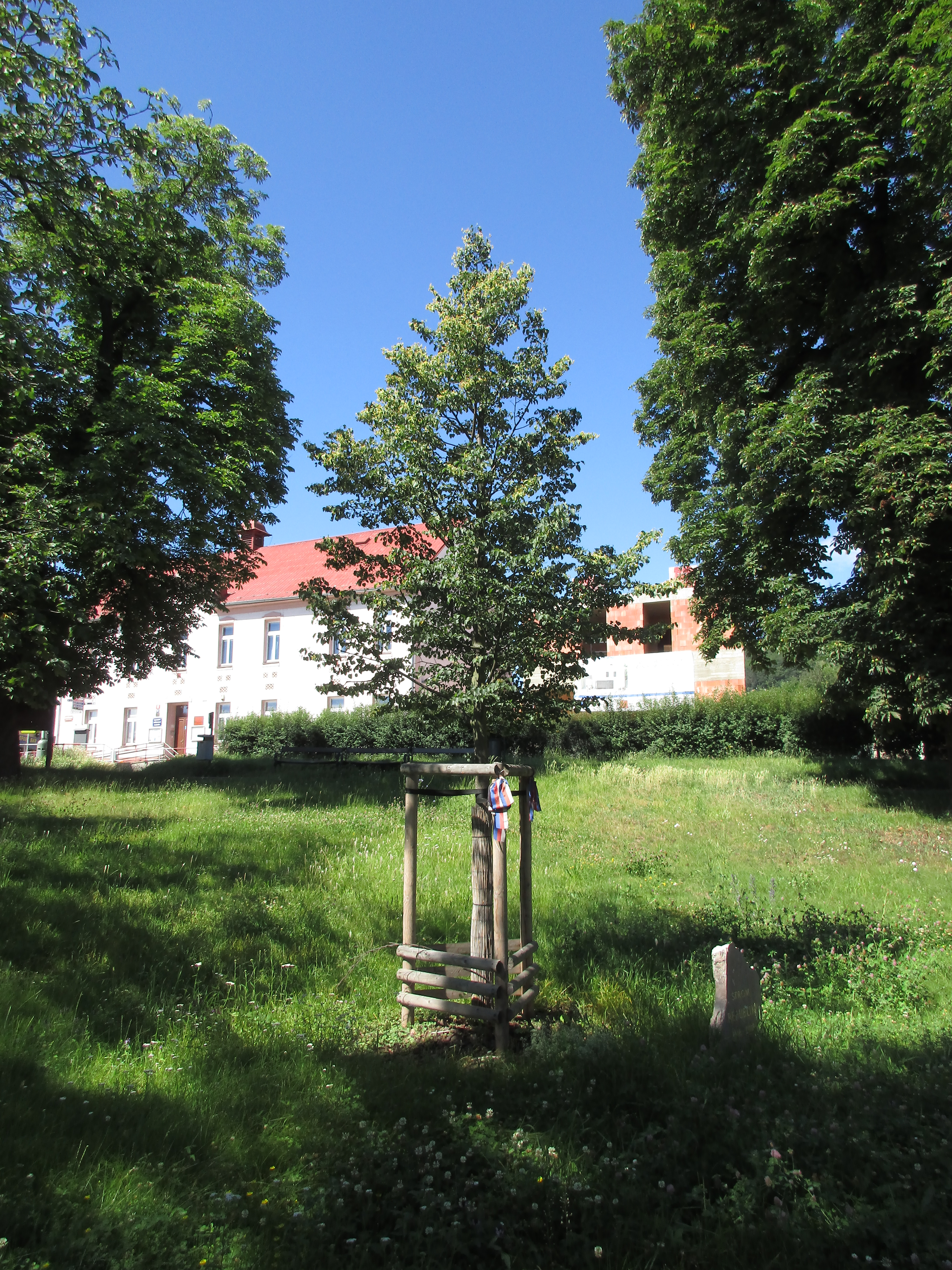 Lípa republiky. Praha 5 - Radotín, náměstí Osvoboditelů. Vysazena 28. října 2018.